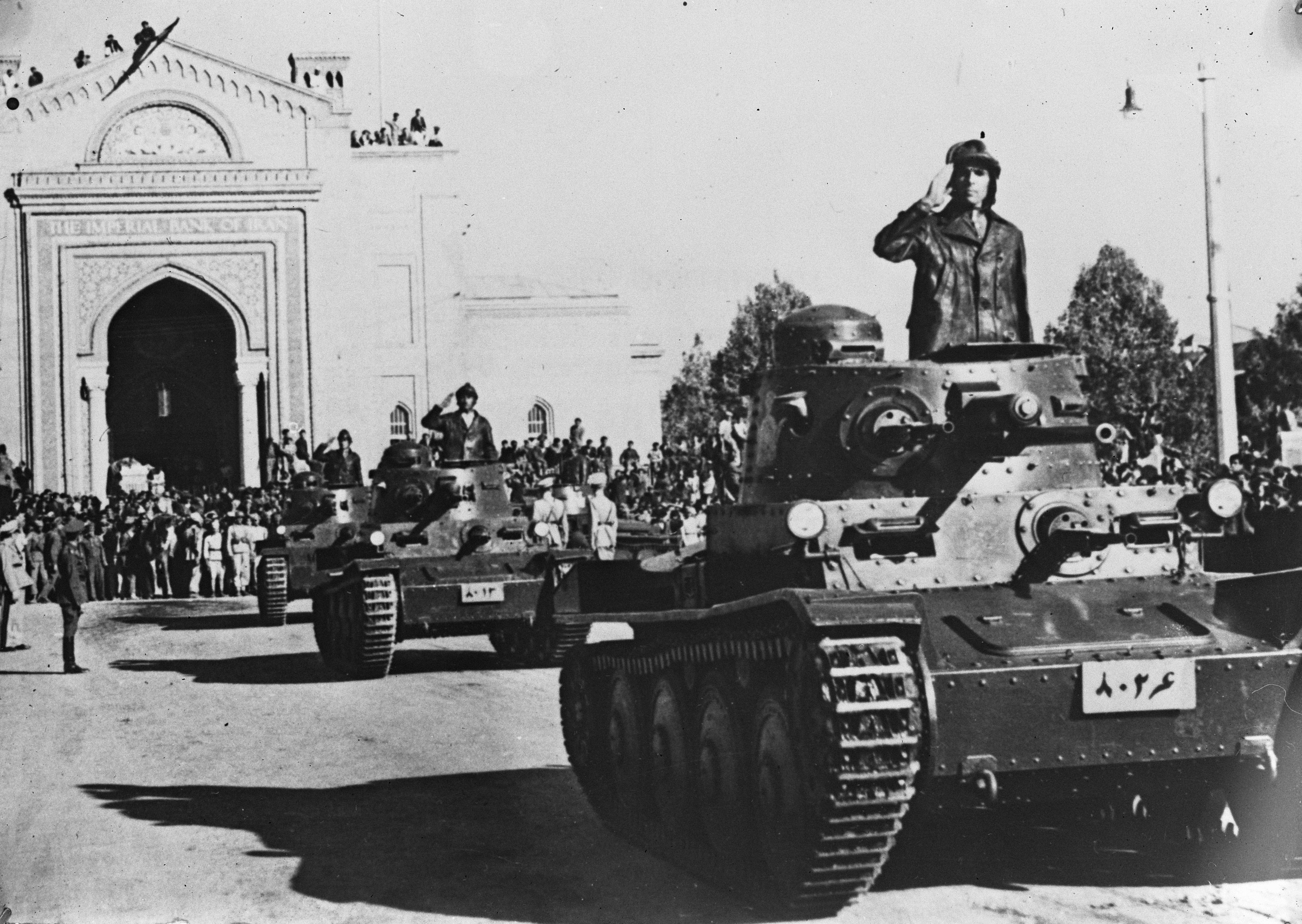 Collectie / Archief : Fotocollectie Anefo Reportage / Serie : [ onbekend ] Beschrijving : Azerbeidsjan capituleert Datum : 15 december 1946 Locatie : Azerbeidzjan Fotograaf : Agence France Presse (AFP) Auteursrechthebbende : Nationaal Archief Materiaalsoort : Glasnegatief Nummer archiefinventaris : bekijk toegang 2.24.01.09 Bestanddeelnummer : 901-9710